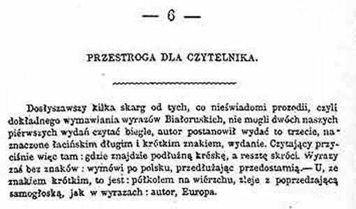 Беларуская (тарашкевіца): Прадмова да выданьня баляды «Нячысьцік» (1853) Аляксандра Рыпінскага